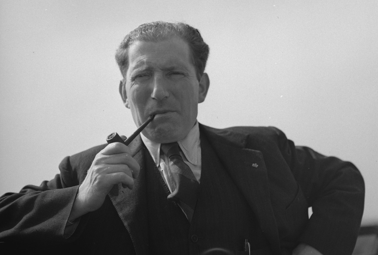 De schrijver Herman de Man zal naar Curaçao vertrekken om leiding te geven aan de omroep aldaar. Hij belandde in 1943 via Spanje en Portugal in Londen waar hij terecht kwam bij de Rijksvoorlichtingsdienst en Radio Oranje. Bij koninklijk besluit van 9 september 1943 werd zijn naam officiëel gewijzigd in De Man. Nog in hetzelfde jaar werd hij door ruzie met zijn superieuren overgeplaatst naar Curacao om daar de plaatselijke omroep gestalte te geven. Ook daar ontstonden tal van conflictueuze situaties [bron: Collectie: Fotocollectie Anefo Locatie: Londen